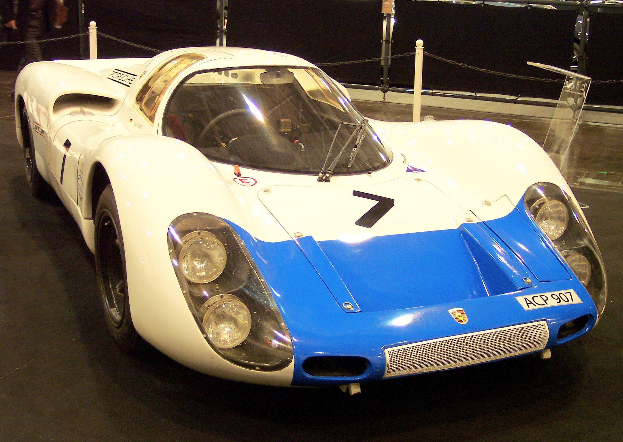 Porsche 907